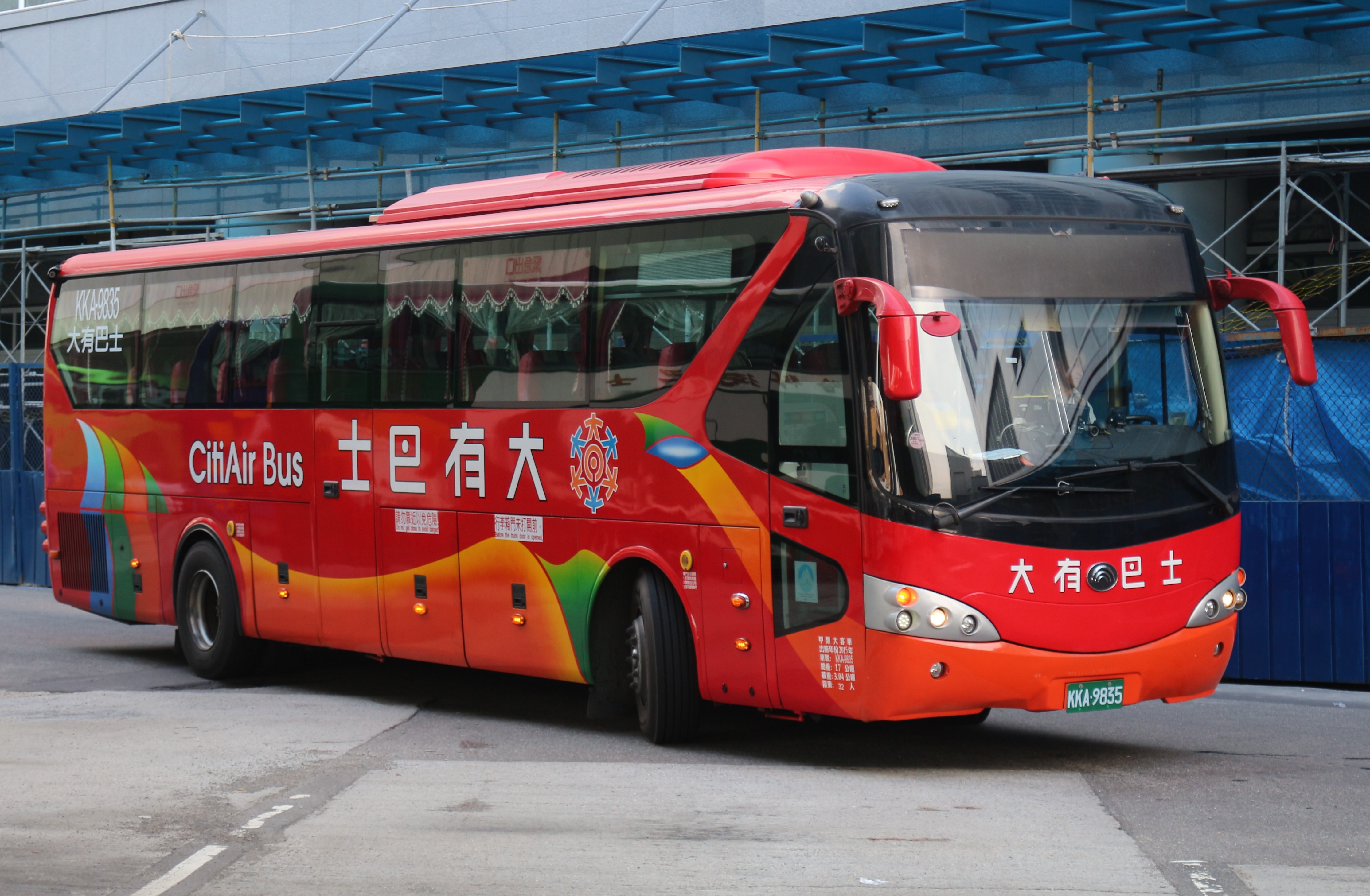 中文（台灣）: 大有巴士2015 YUTONG ZK6129HC (原遊覽車業者車輛)